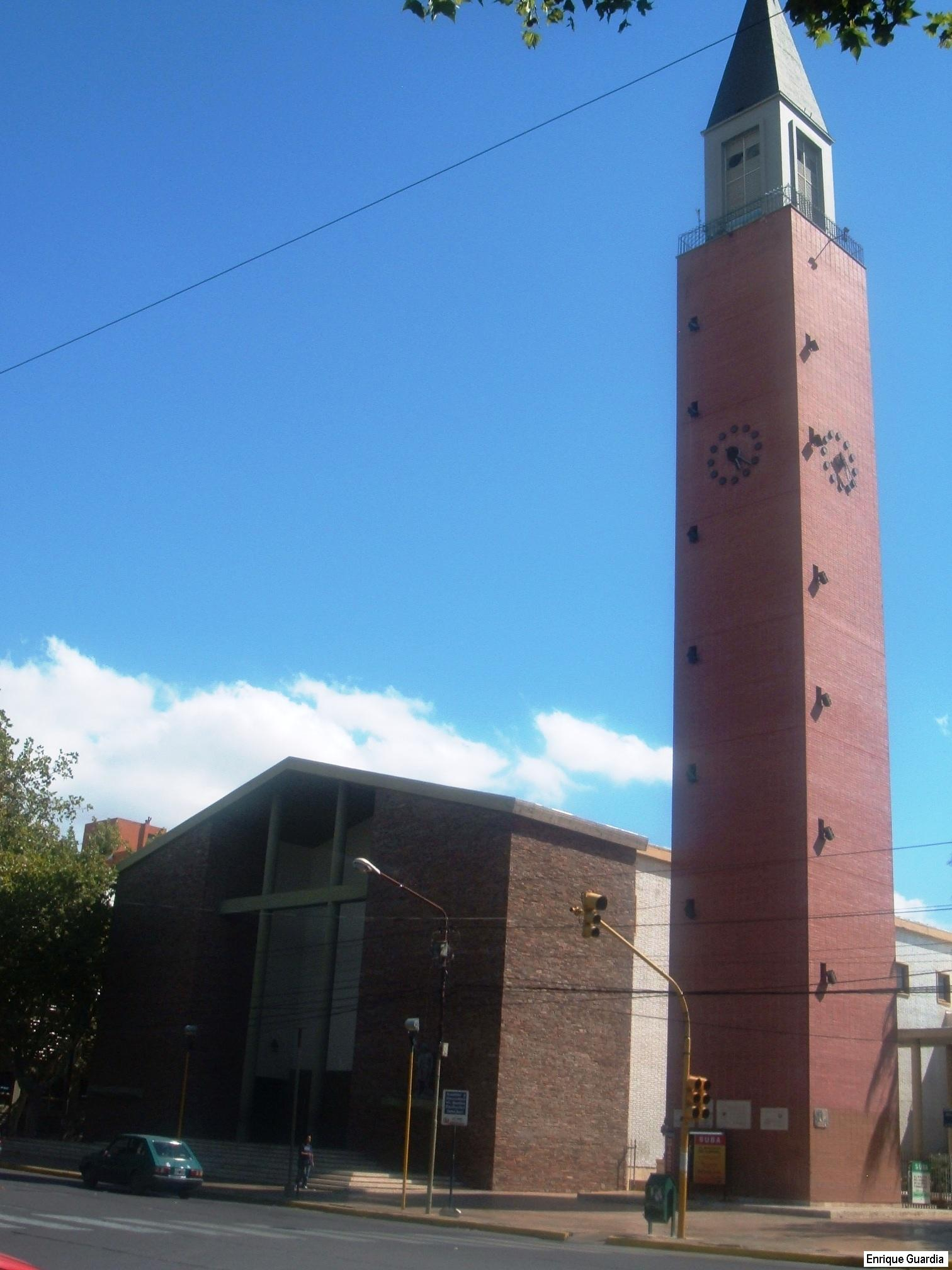 Vista de la Catedral de la ciudad de San Juan, en la provincia del mismo nombre, Argentina